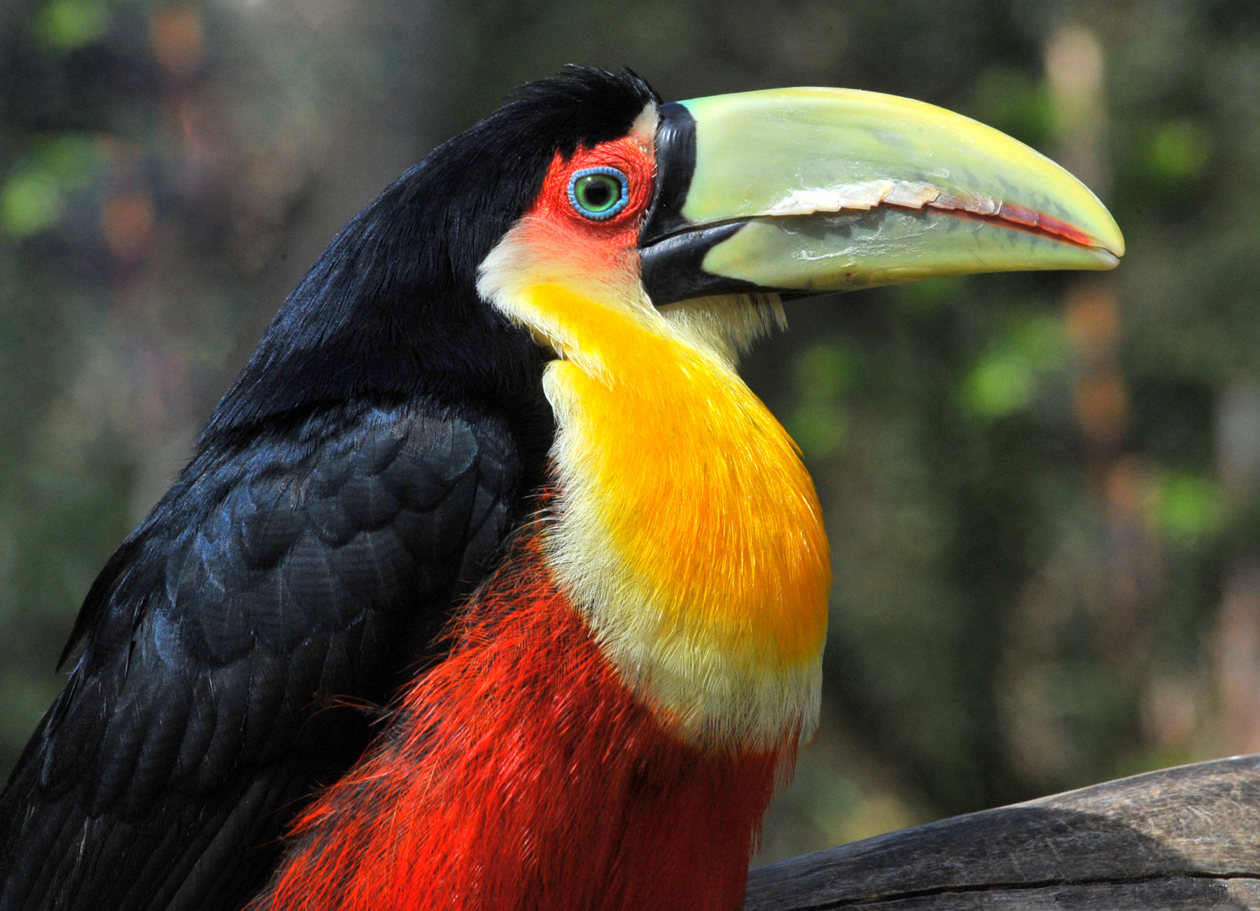 O tucano-de-bico-verde é uma ave piciforme e da família Ramphastidae. Seu nome científico significa: do (grego) ramphastos, ramphestes = longa espada, grande espada; e do (latim) di = separado, apartado; e colorus = colorido; dicolorus = colorido, com cores separadas. ⇒ Ave colorida com nariz grande como uma espada. WikiAves